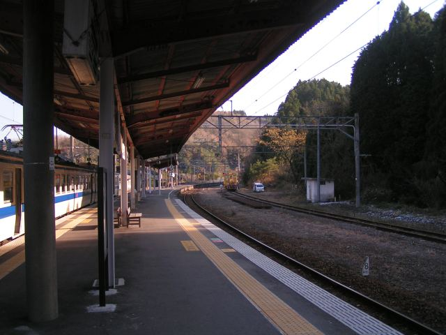 霧島神宮駅ホーム